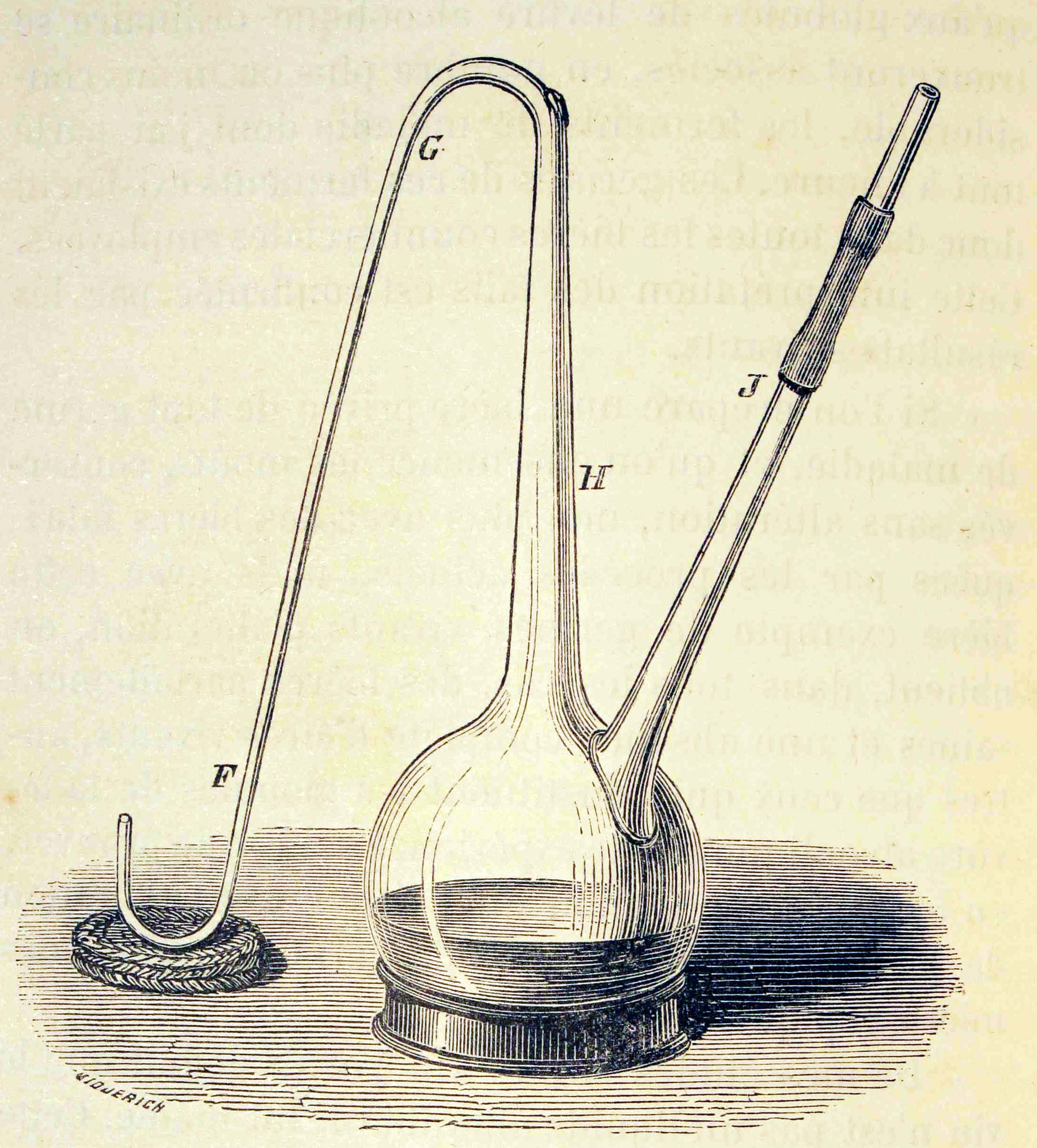 "Ballon à col sinueux employé par M. Pasteur dans ses expériences contre la génération spontanée". Ilustraciones de la obra : Les merveilles de l'industrie ou, Description des principales industries modernes / par Louis Figuier. - Paris : Furne, Jouvet, [1873-1877]